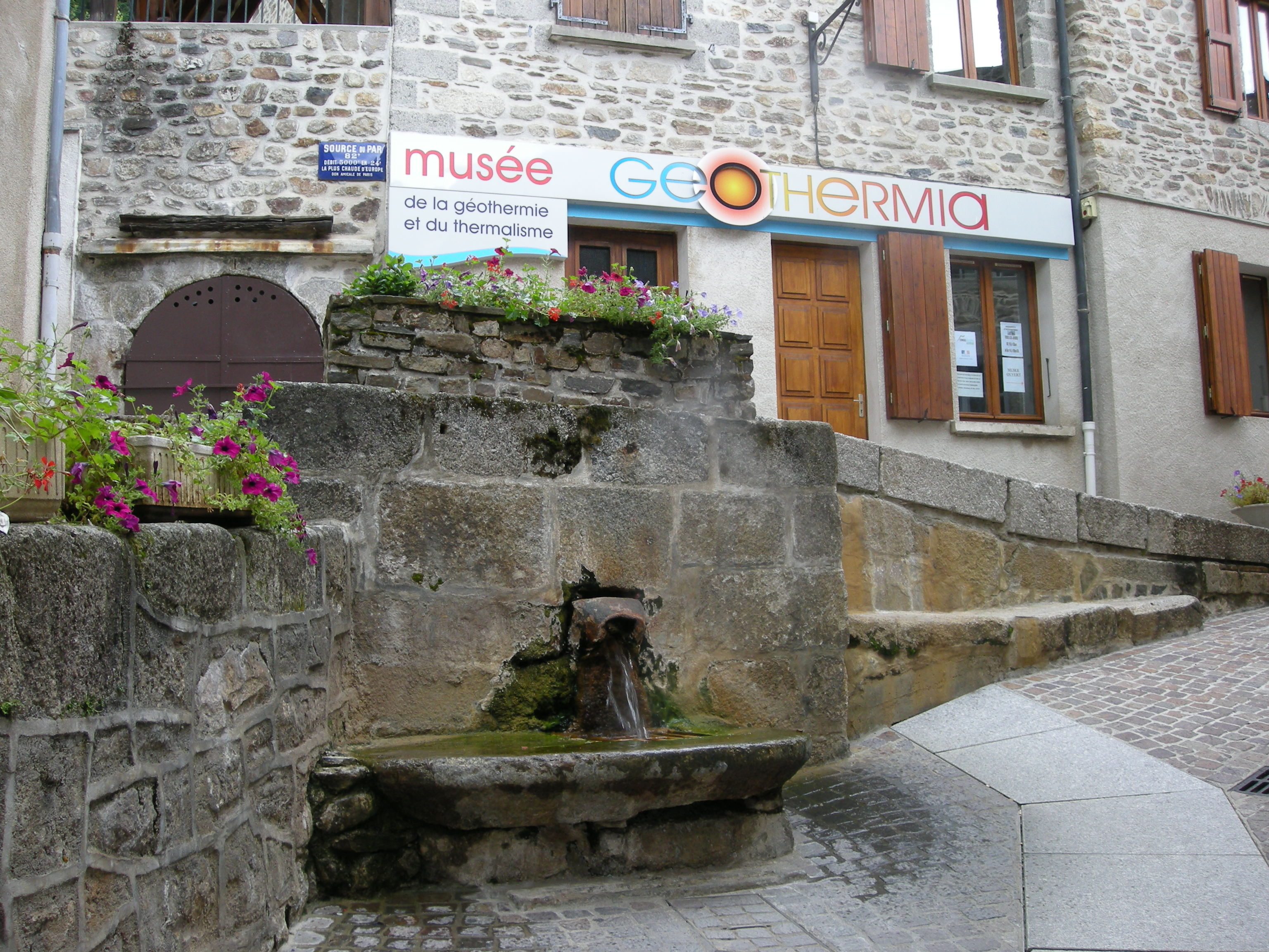 Chaudes-Aigues, station thermale unique dans le Cantal avec ses sources d'eaux chaudes (Cantal)